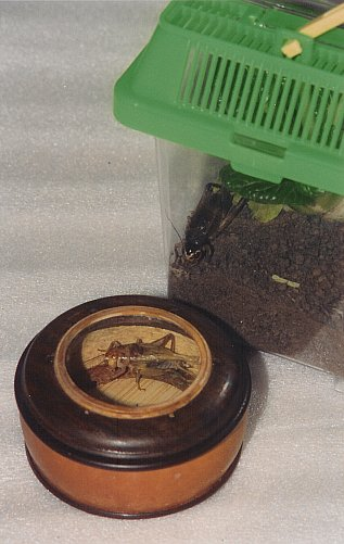 Kleines Terrarium mit Grille für kinder (Japan 2003) und chinesischer Grillenkäfig (Holz, Kürbis, Glas; Anf. 20.Jh.)